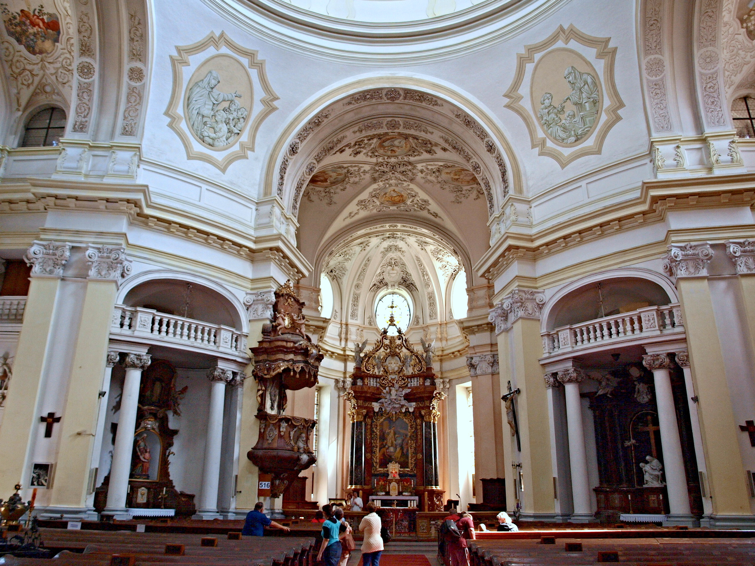 Jablonné v Podještědí - klášter (2)